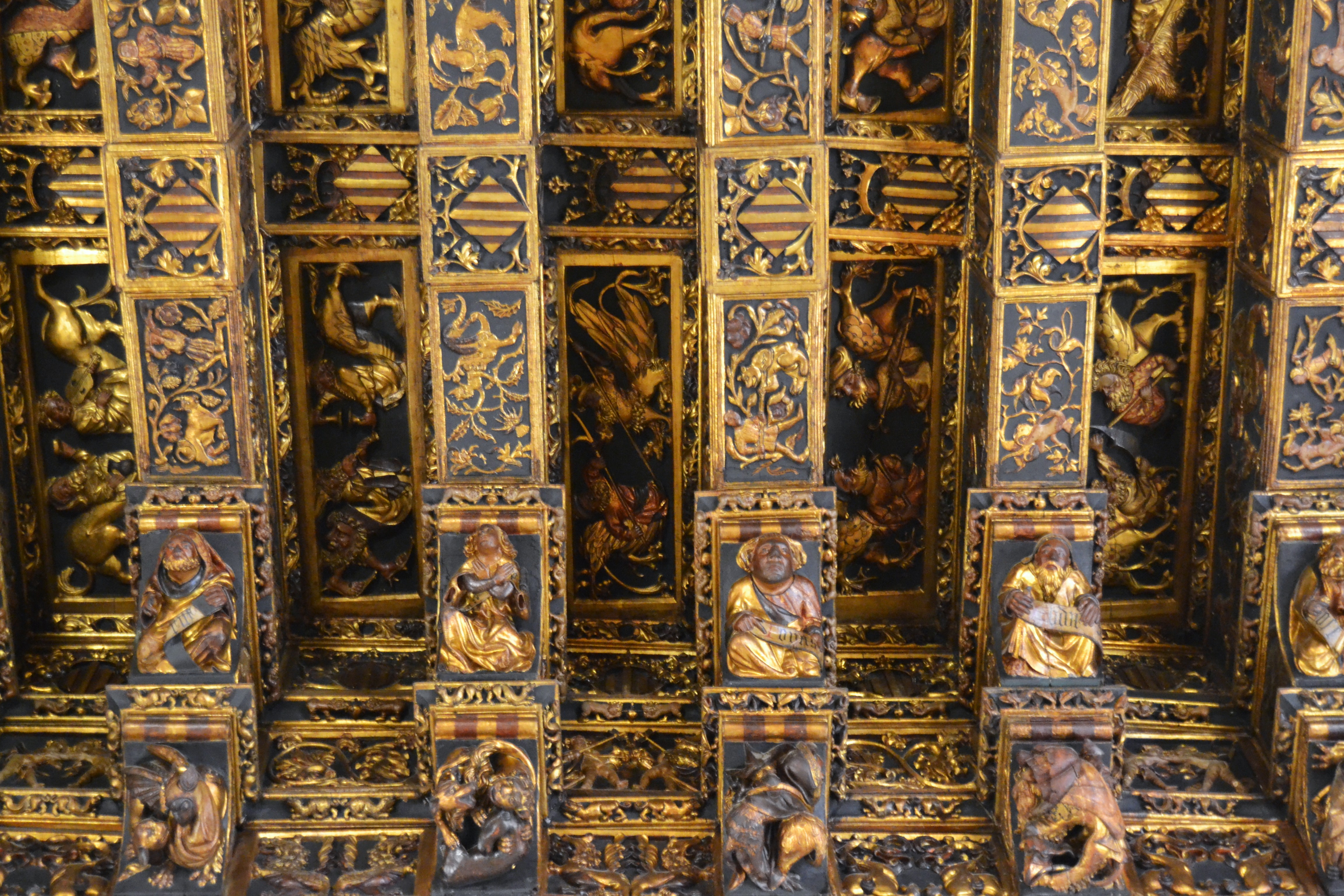 Detall del sostre de l'antiga casa de la Ciutat de València.